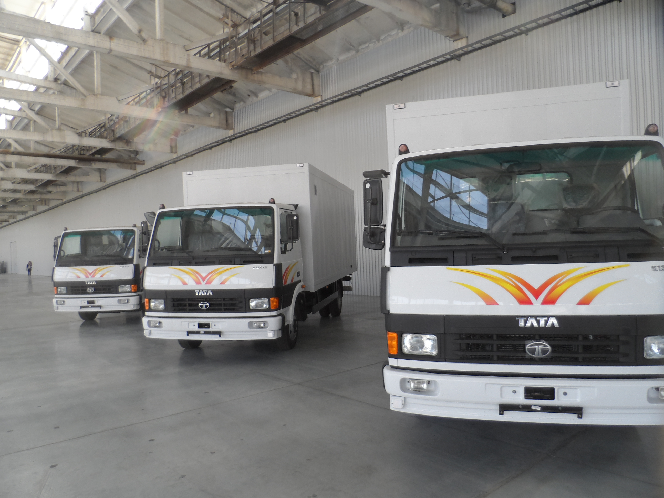 Производство завода